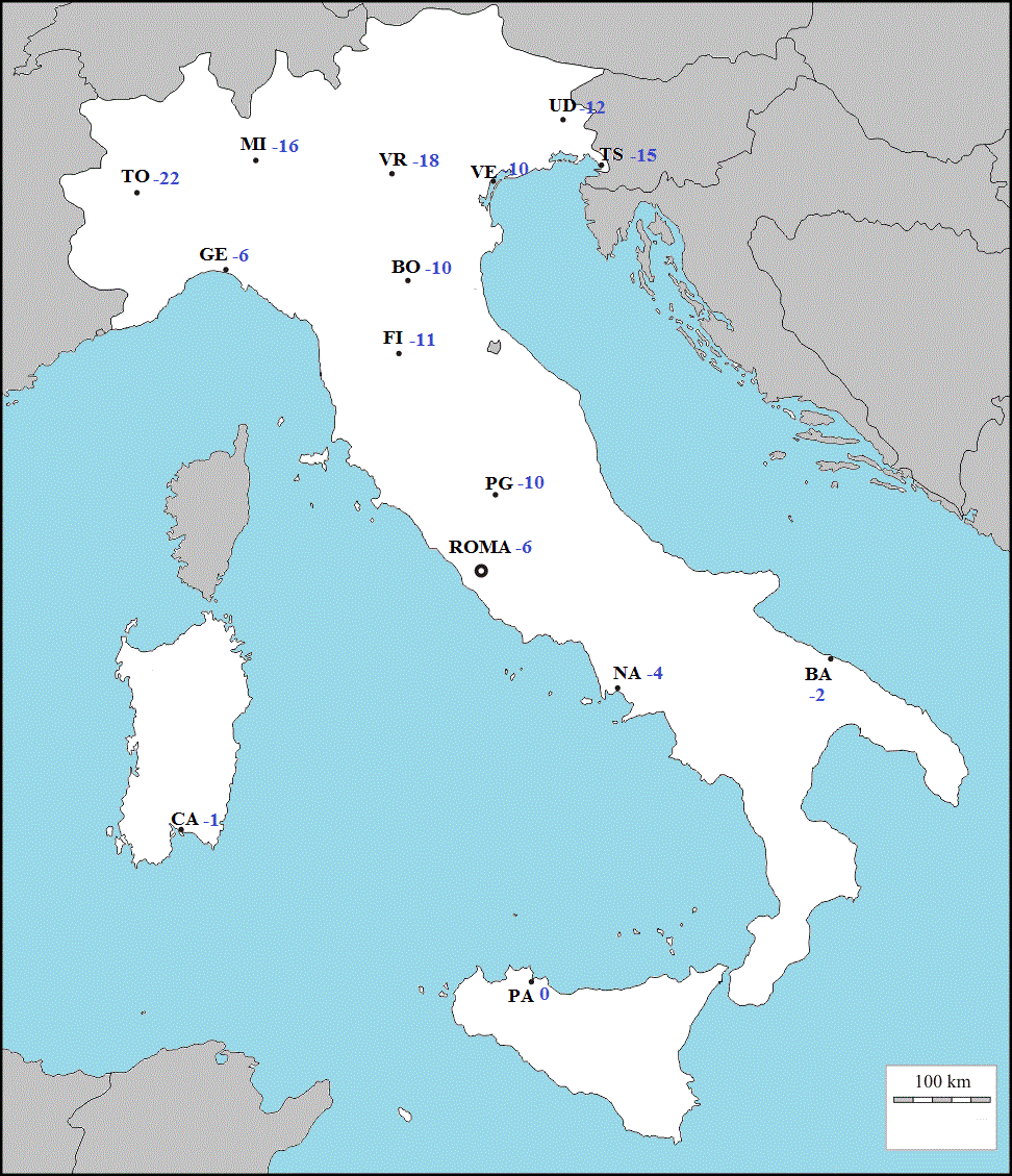 Temperature minime in Italia nel 1956 - Fonte